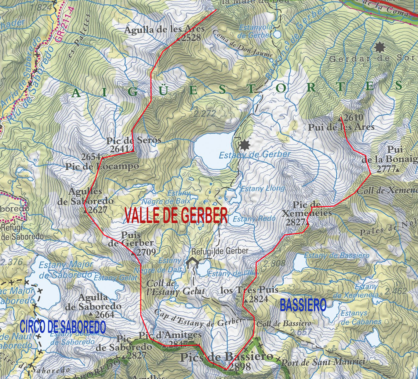 Valle de Gerber contorneada